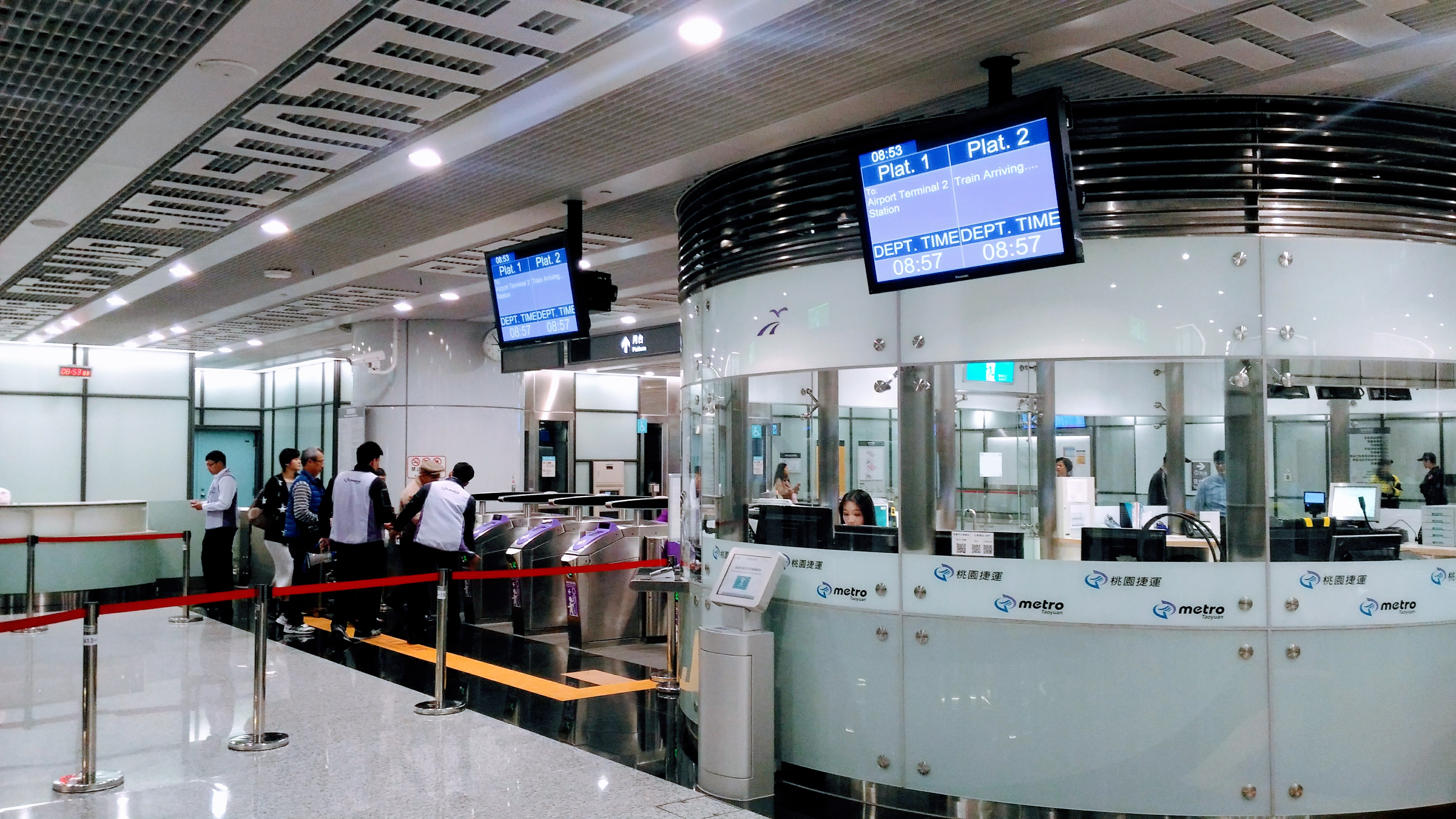 中文（台灣）: 桃園國際機場捷運機場第二航廈站自動閘門與詢問處。